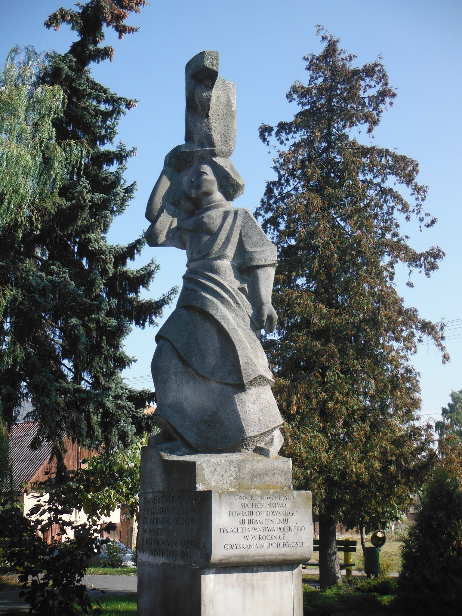 Pomnik Żołnierza i Partyzanta w Ostrowi Mazowieckiej (tzw. "Ostrowska Nike") autorstwa Karola Tchorka